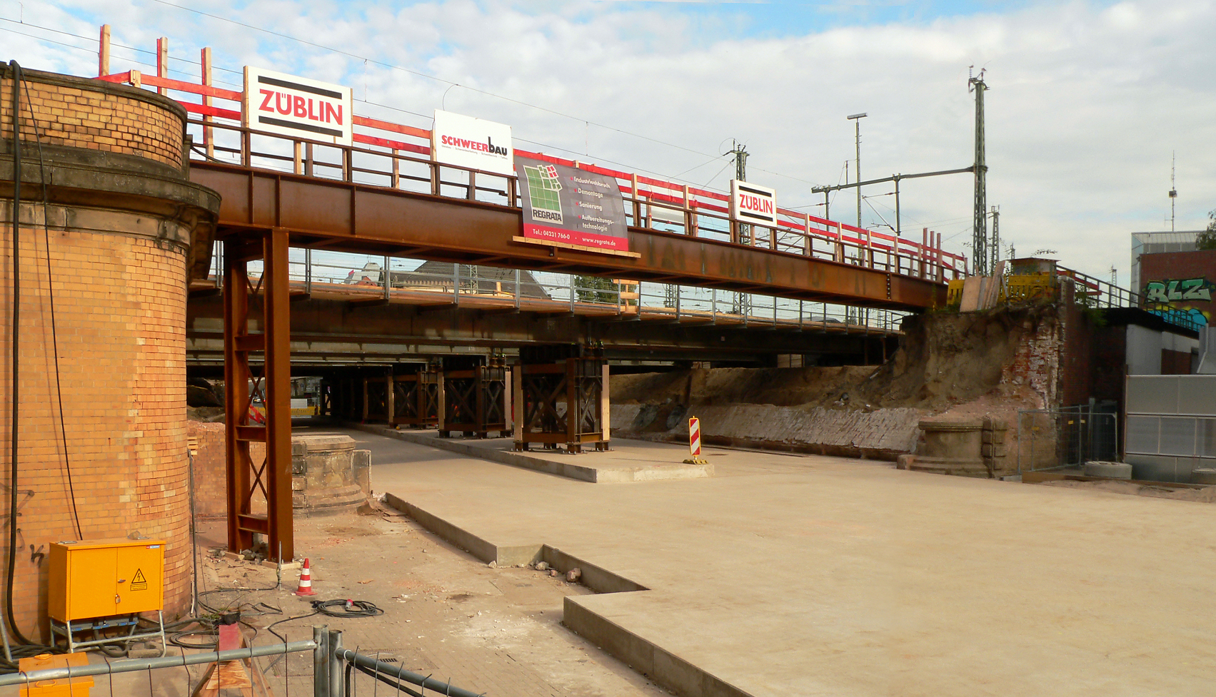 Eisenbahnüberführung über die Königstraße in Hannover, Baustelle mit Überbrückung der Gleise